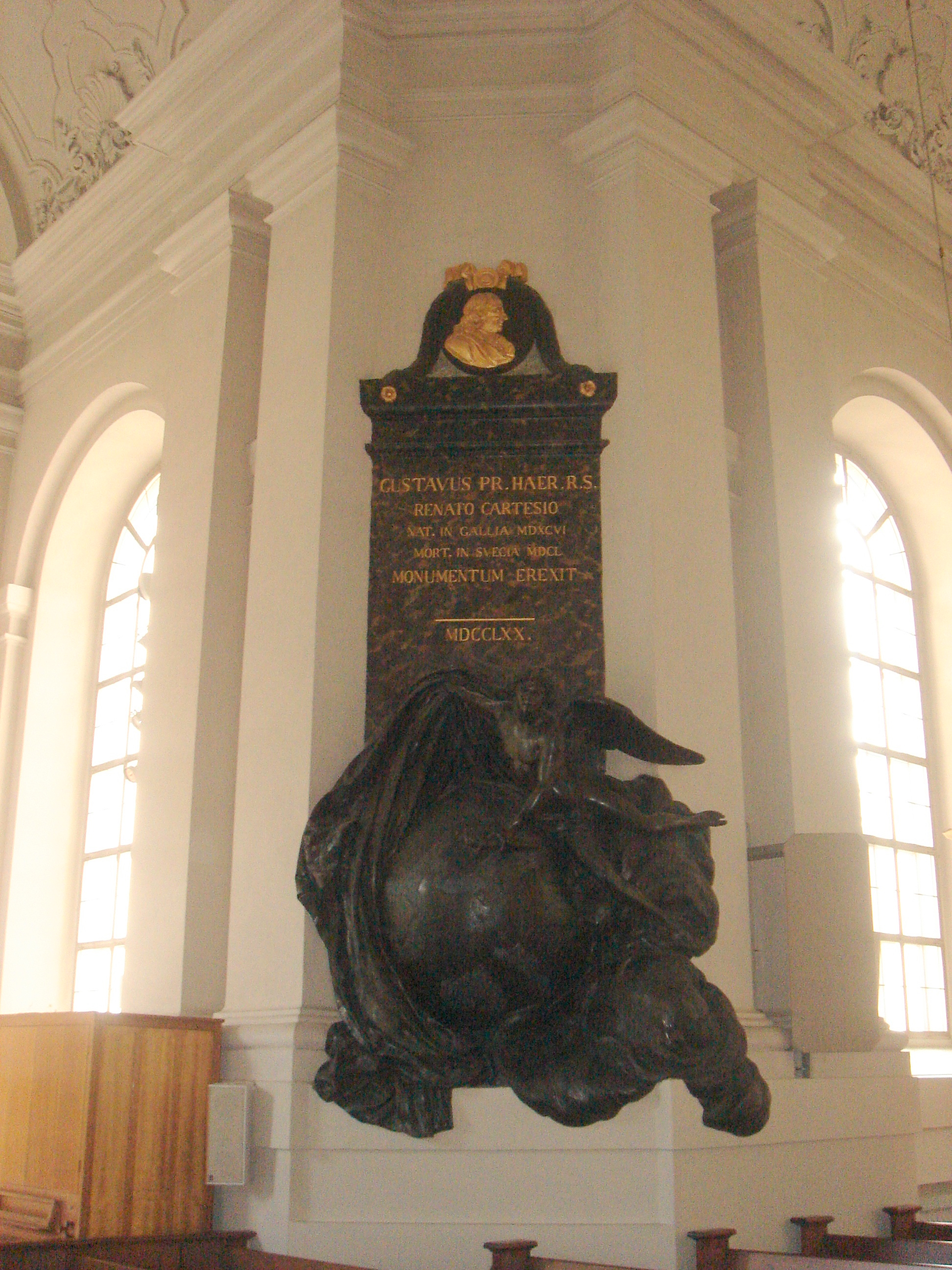 Memorial to Rene Descartes inside Adolf Fredriks Kyrka, Stockholm